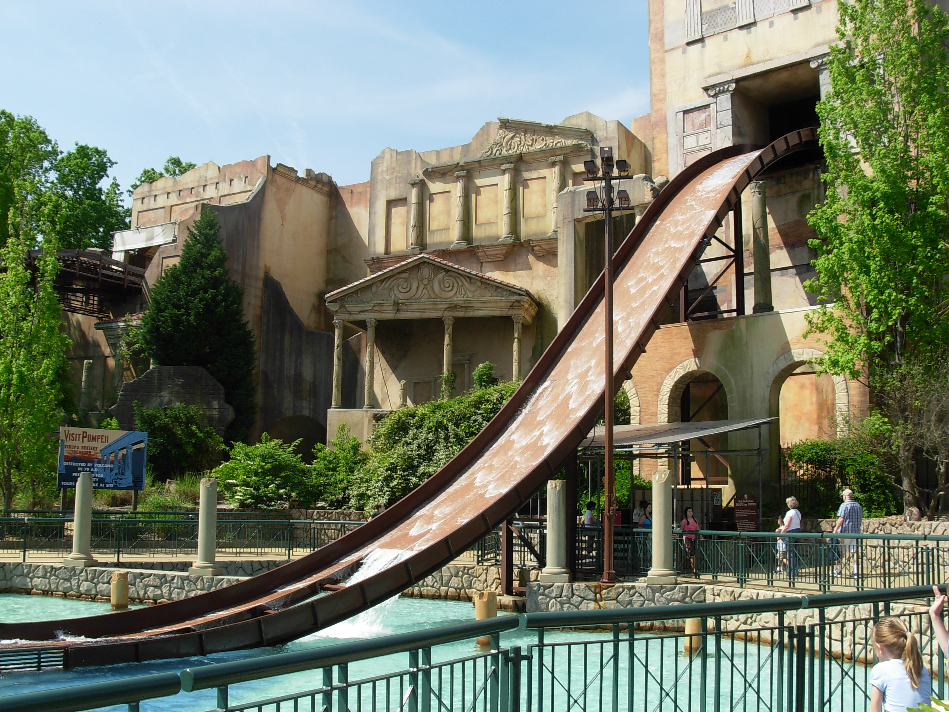 Busch Gardens Europe, Williamsburg Roller coasters Amusement rides